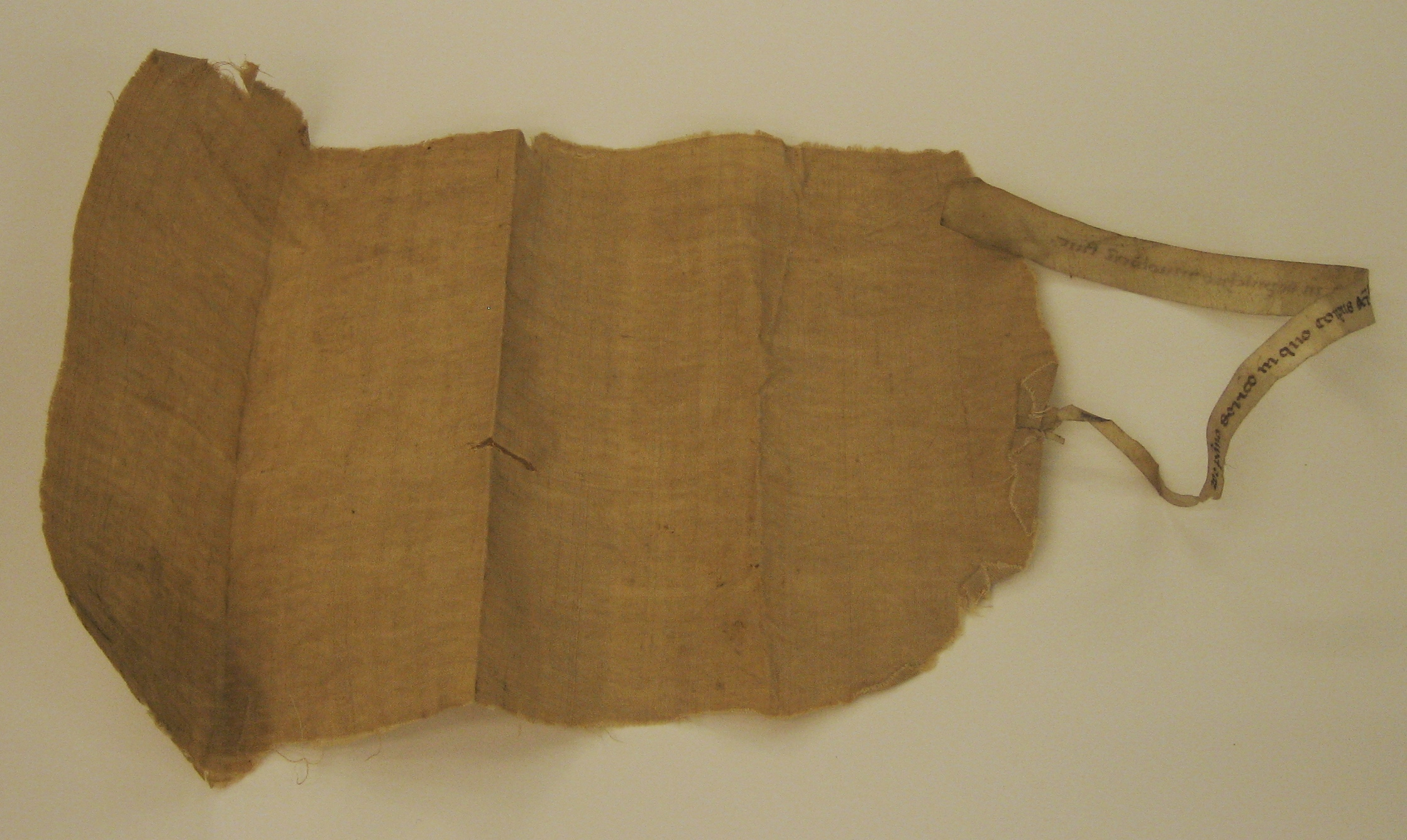 Reliek van lijkwade van St. Willibrord, plat geweven beige zijden weefsel met één rechte zijde, twee maal gevouwen, waaraan perkamenten cedula (18.8 x 1.0 cm) met "de panno serico, in quo corpus Sancti Willibrordi in sepulchro involutum fuit"